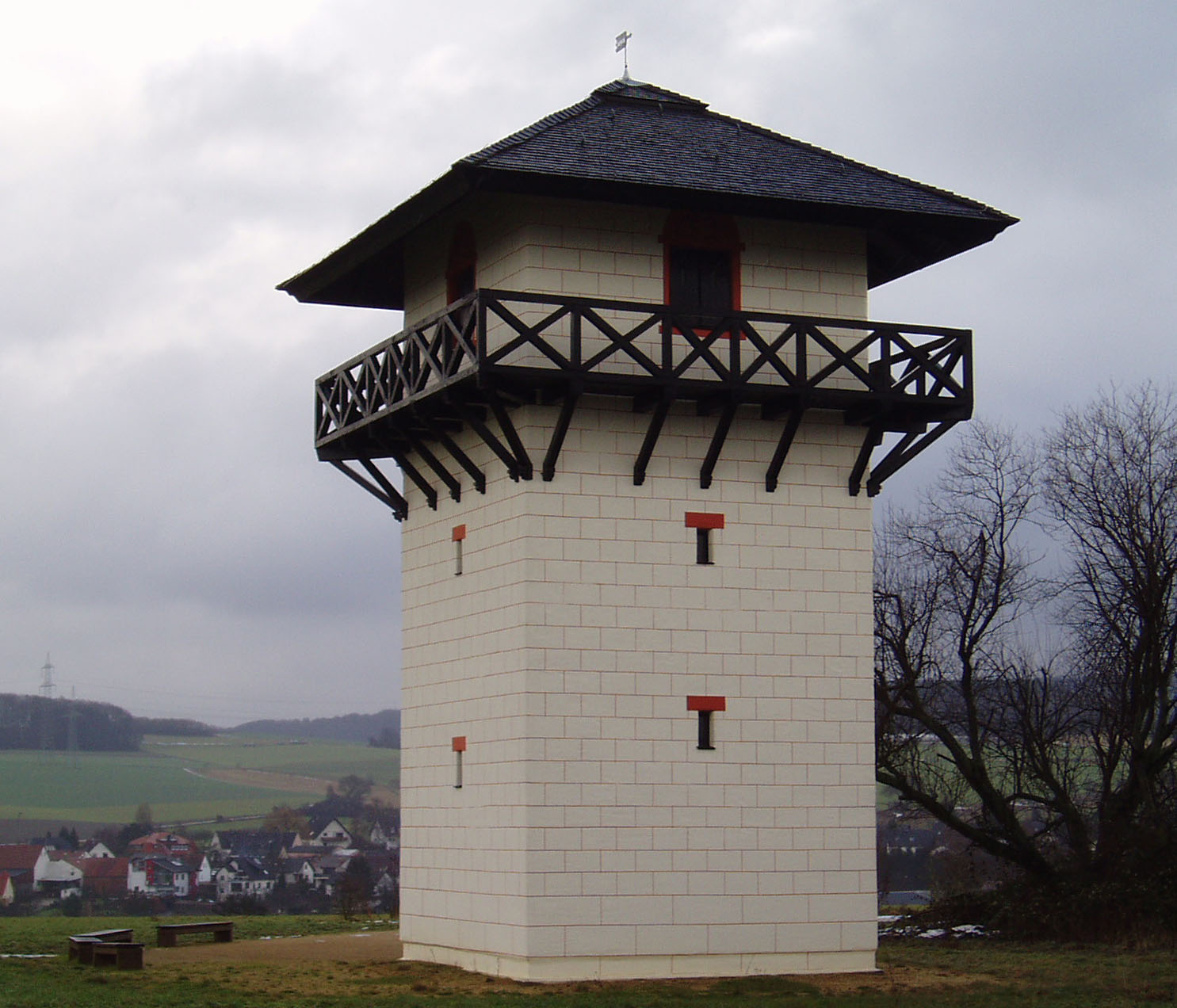 Anlässlich des Hessentages 2002 in Idstein nachgebauter römischer Wachturm am Limes auf der Dasbacher Höhe zwischen Niedernhausen und Idstein im Taunus.